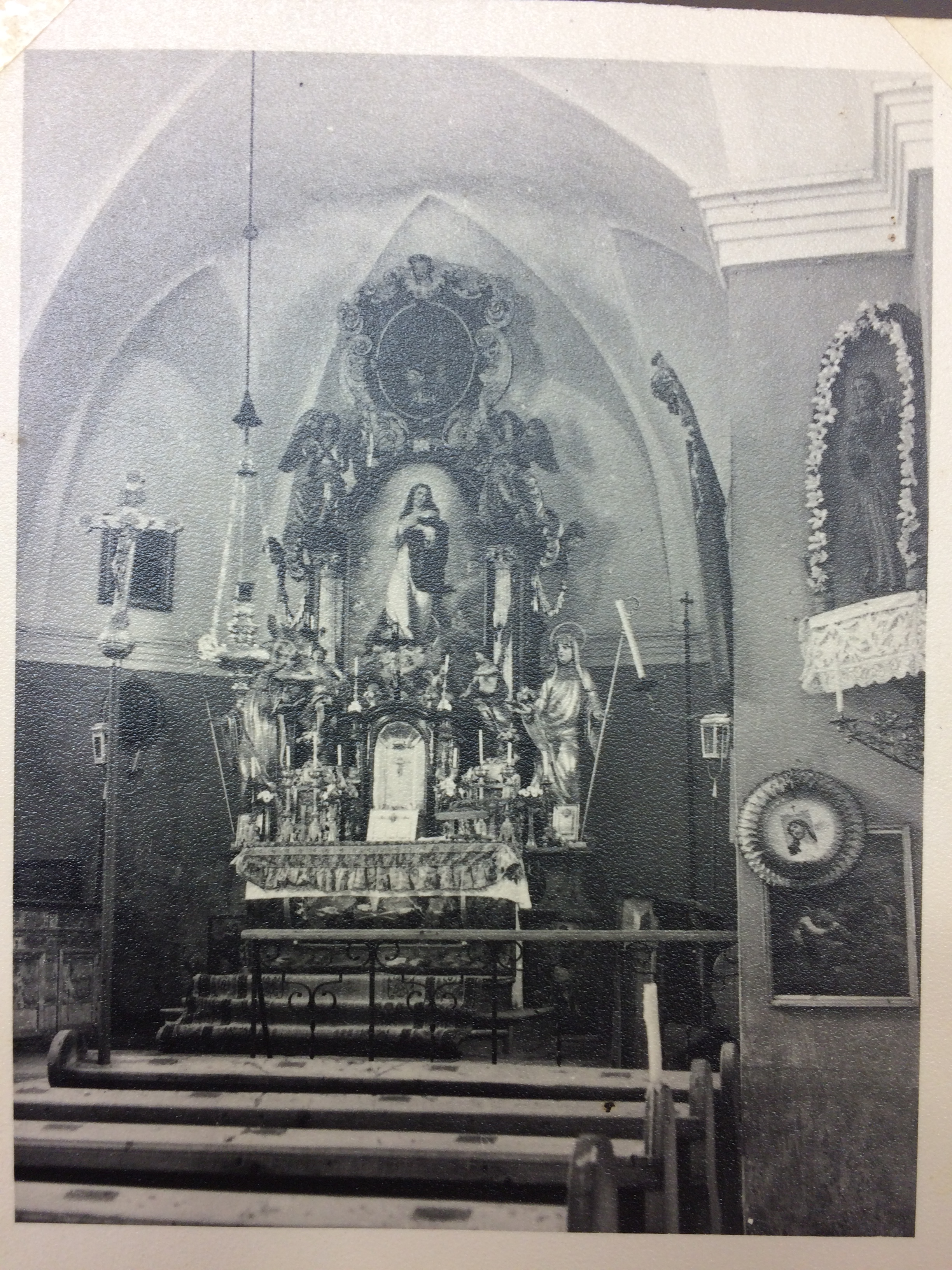 Johanneskirche Ardning (Austria), Pfarre Frauenberg an der Enns, vor dem Brand 1946